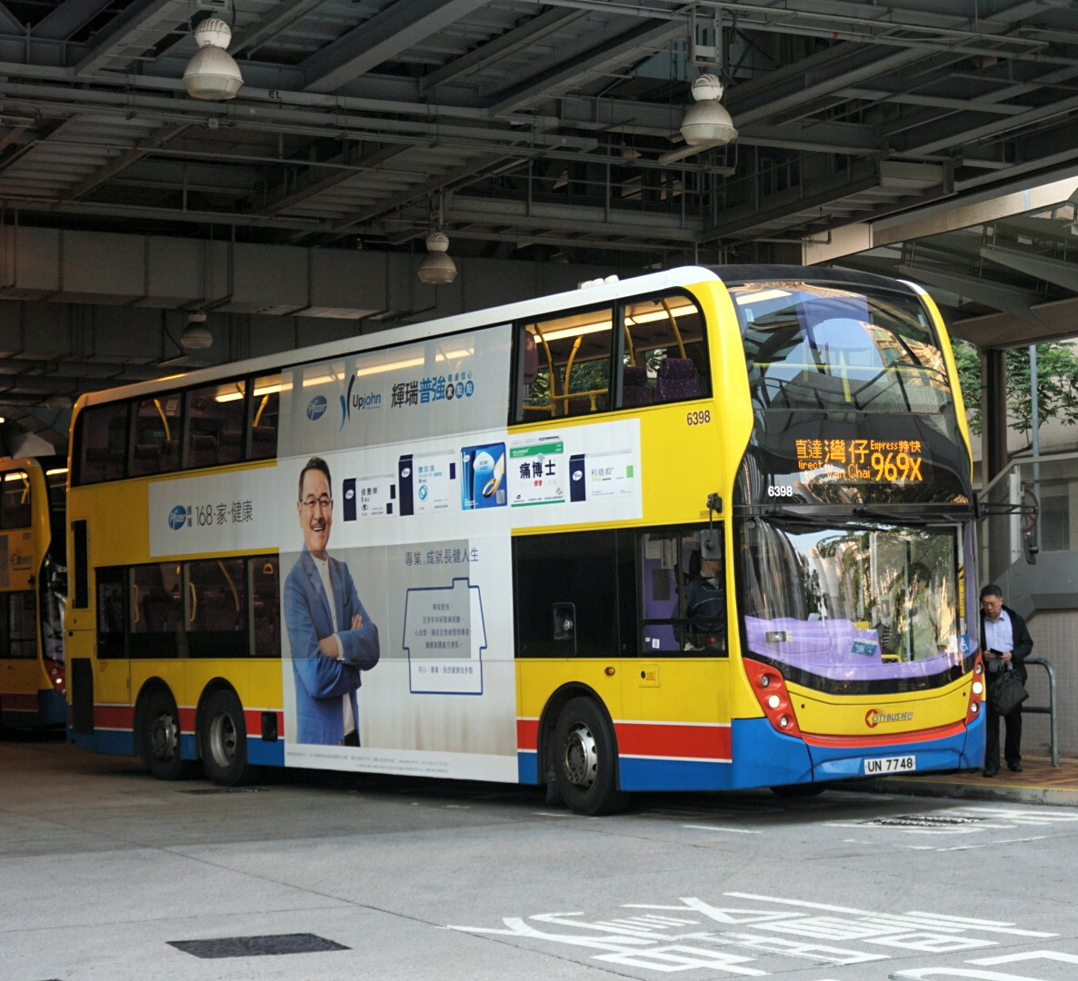 中文（香港）: 過海隧道巴士969X線，正在天水圍市中心上客